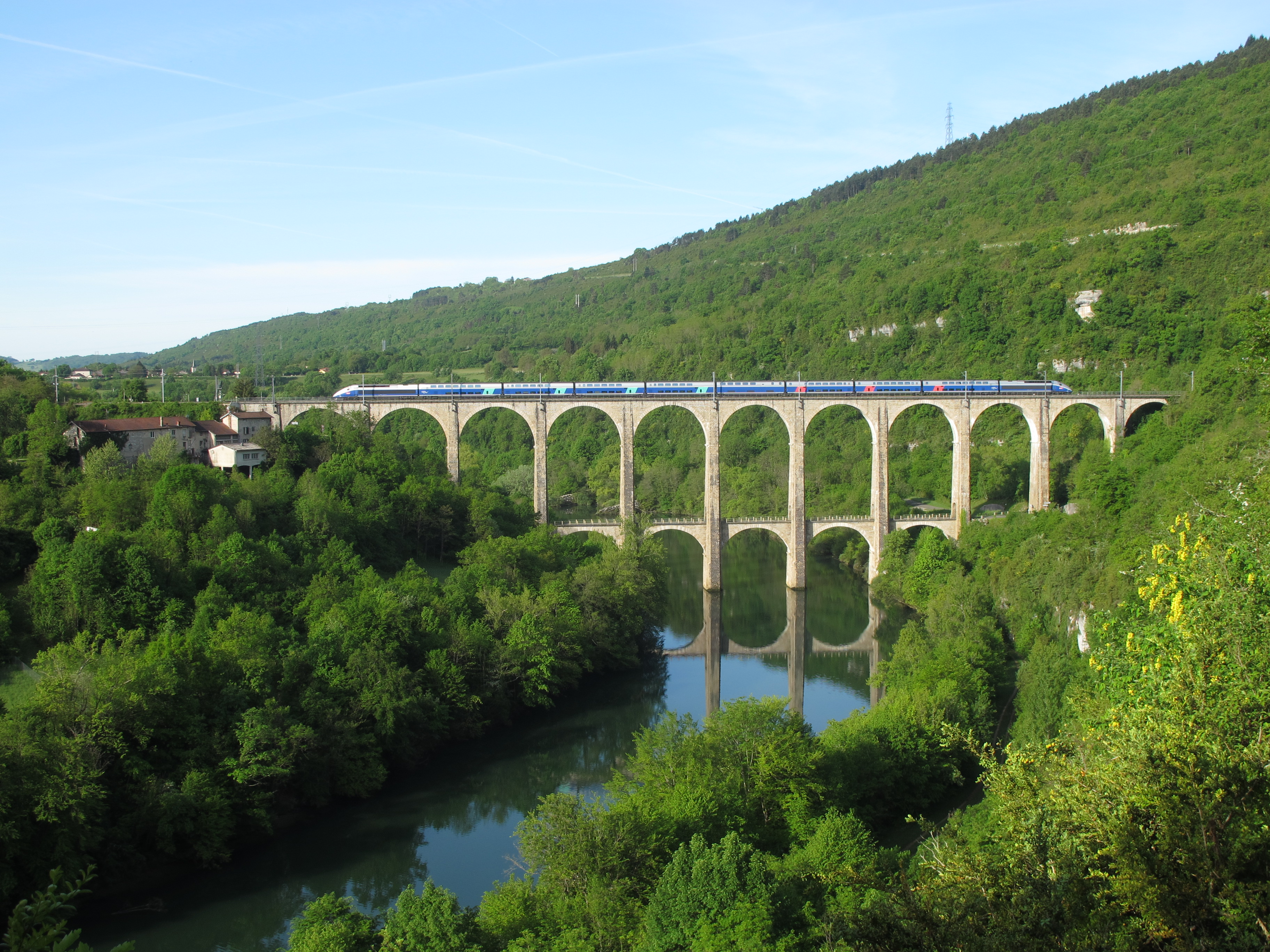 TGV Duplex sur le viaduc de Cize-Bolozon.